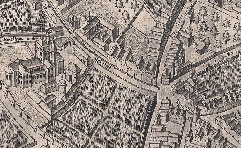 Ausschnitt des Mercator - Stadtplanes, Bereich Weidenbach